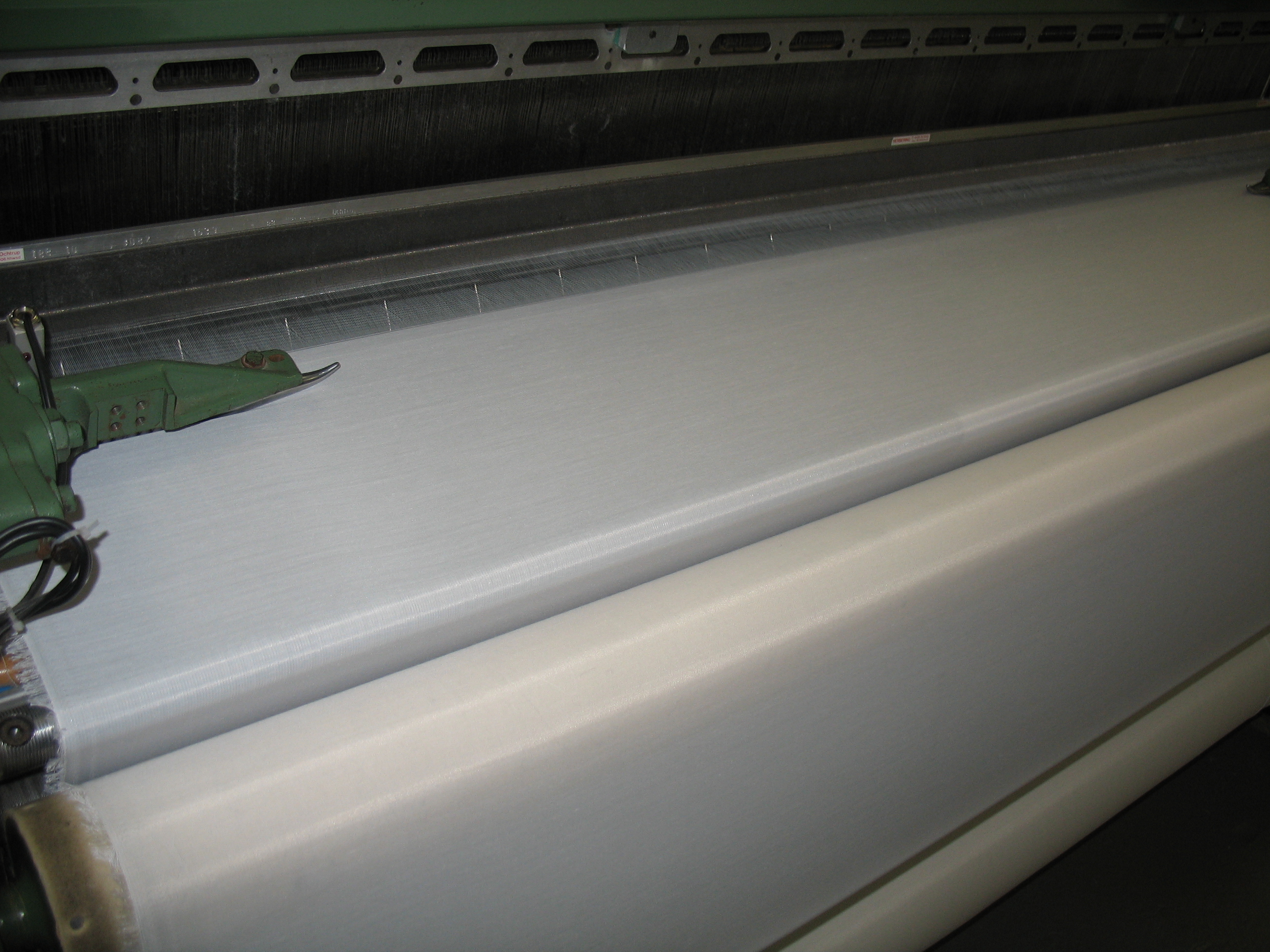 Stafettendüsen an der Luftdüsenwebmaschine